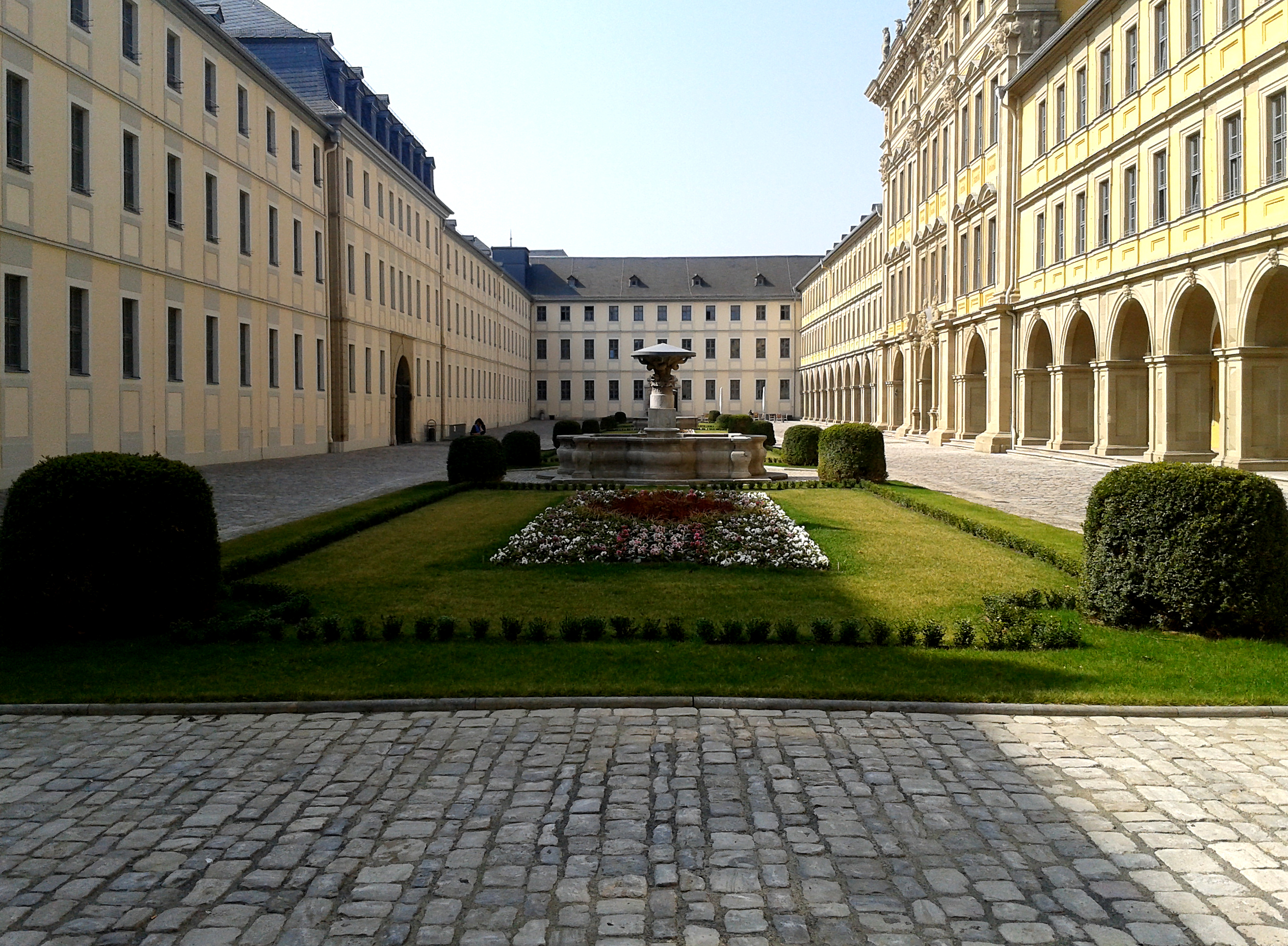 Innenhof des Würzburger Julius-Spitals.